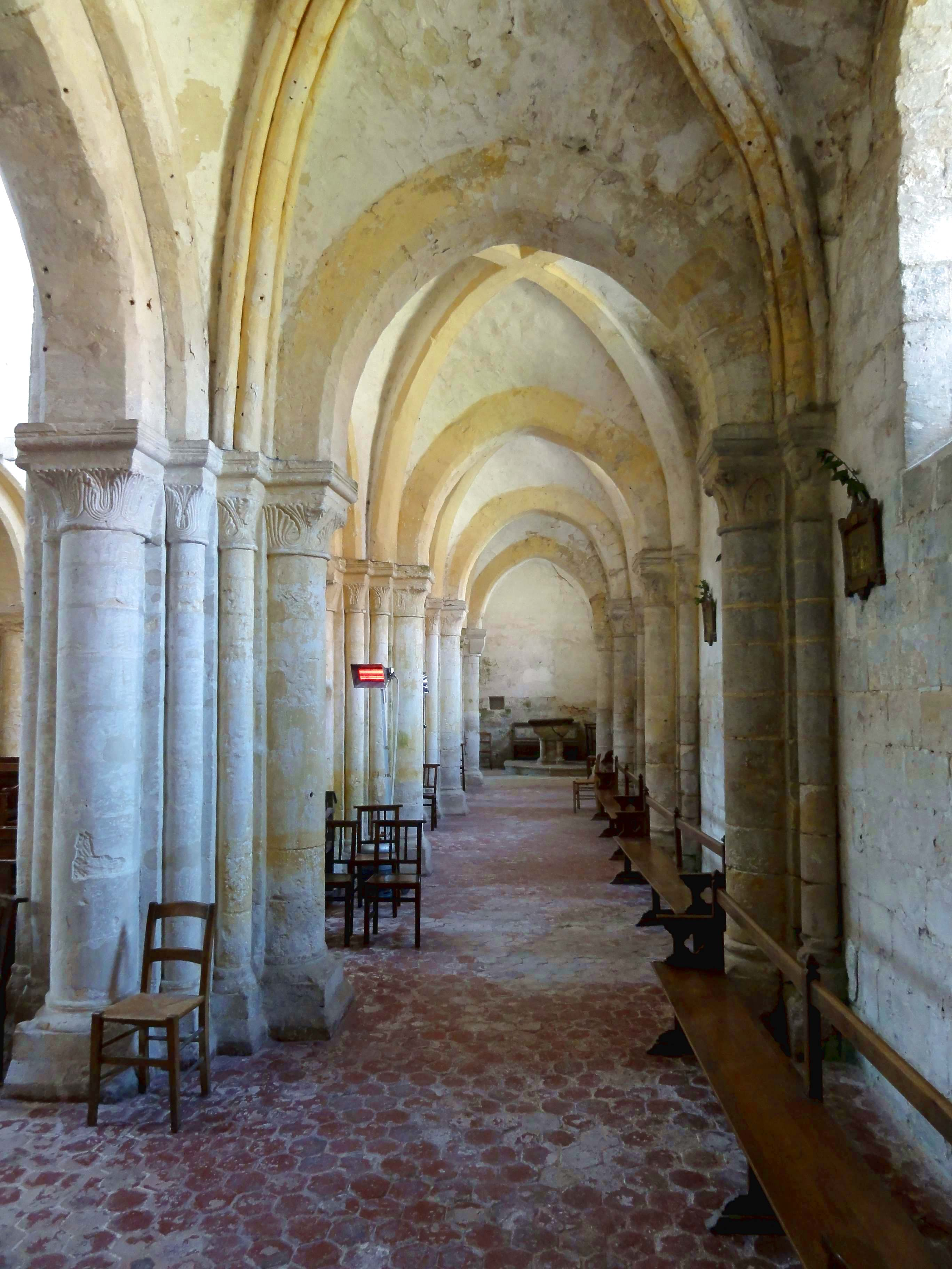 Intérieur de l'église - voir titre.